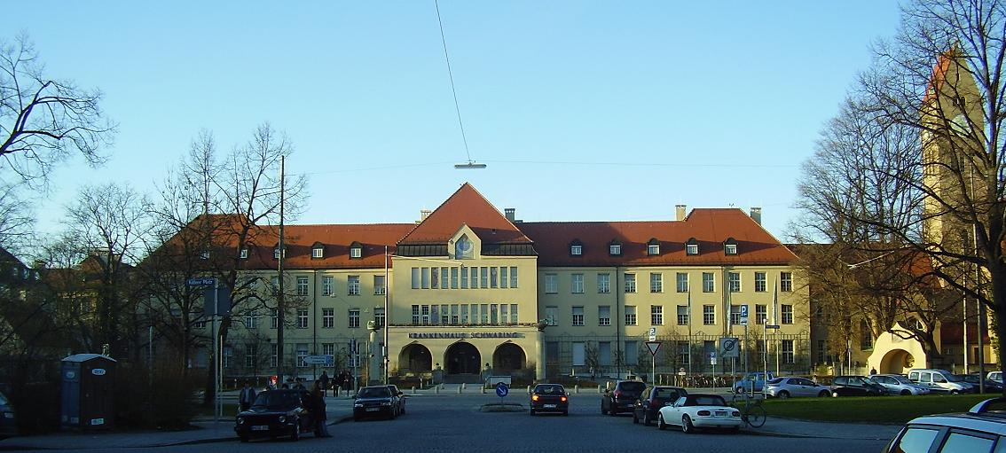 Klinikum Schwabing (Schwabing hospital) in Munich (Germany)